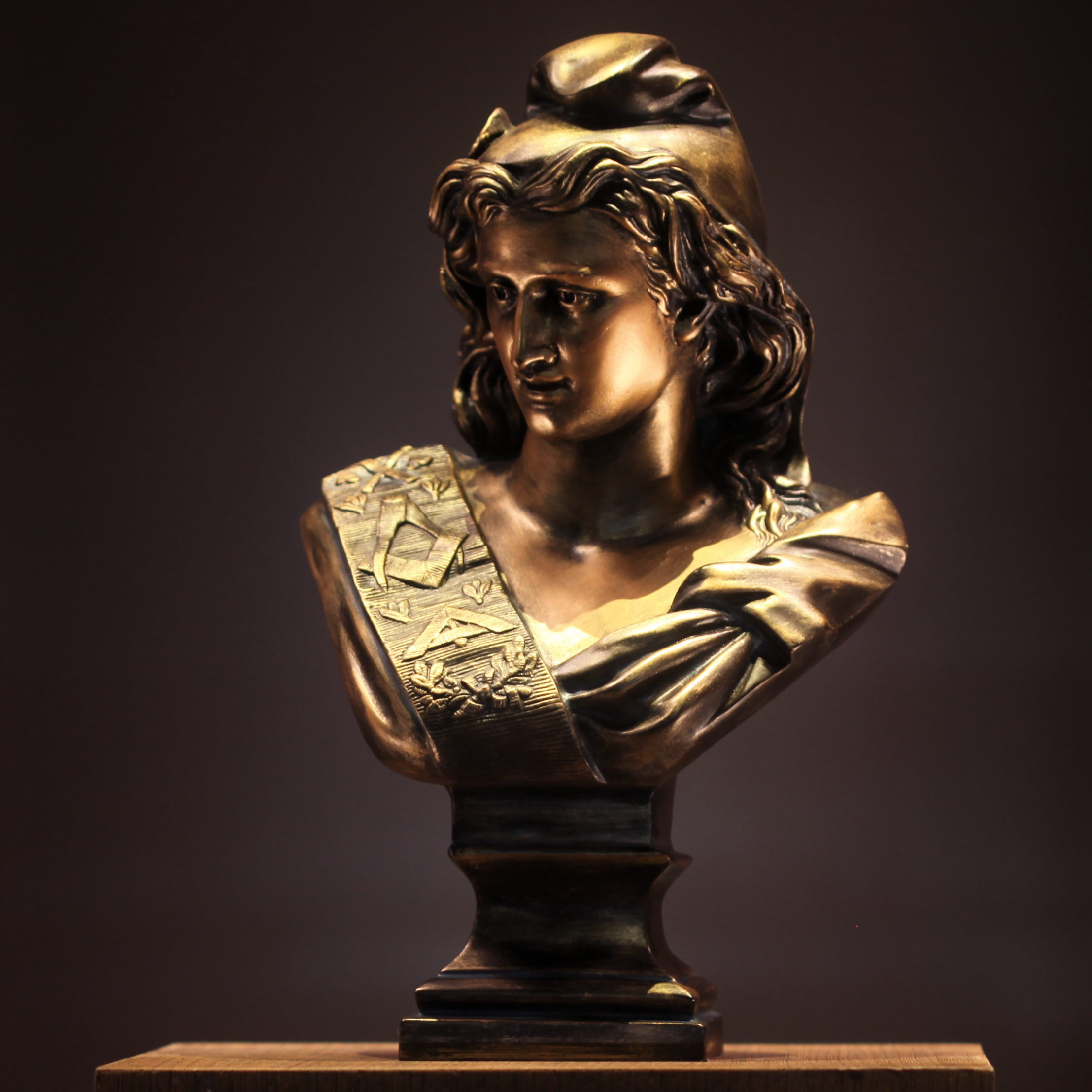 Marianne maçonnique par Jacques France (Paul Lecreux)